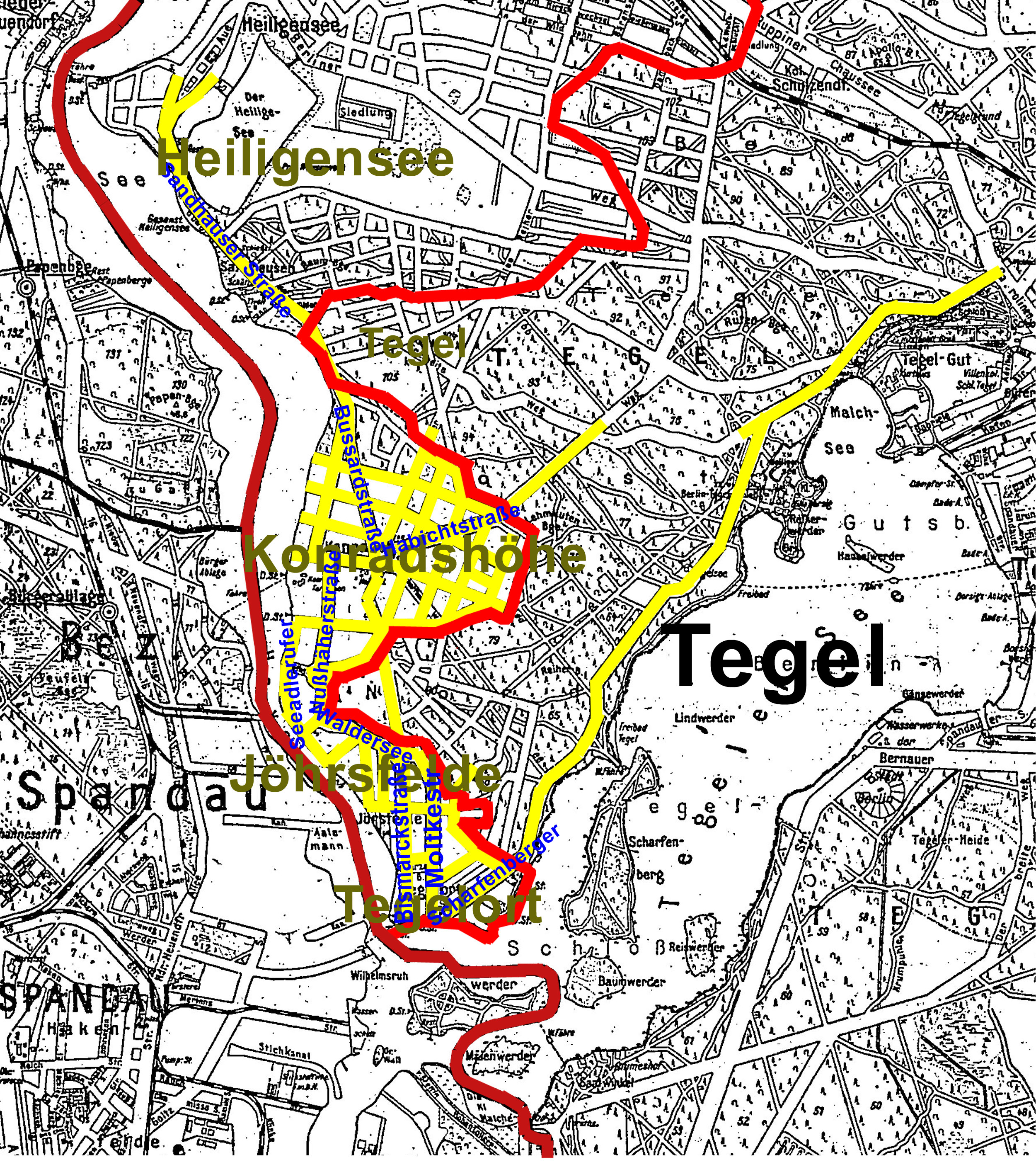 Das Straßensystem der vormaligen Kolonien in Tegel Konradshöhe, Jöhrsfelde, Tegelort auf dem Gebiet des heutigen Ortsteils Berlin-Konradshöhe, wie es im Jahre 1925 bestanden hatte.